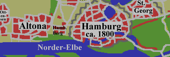 Der "Hamburger Berg" (heute: St. Pauli) um 1800.